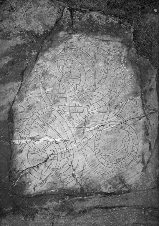 Runstenen U 360 i Goddersta, Skepptuna socken, Sigtuna kommun.